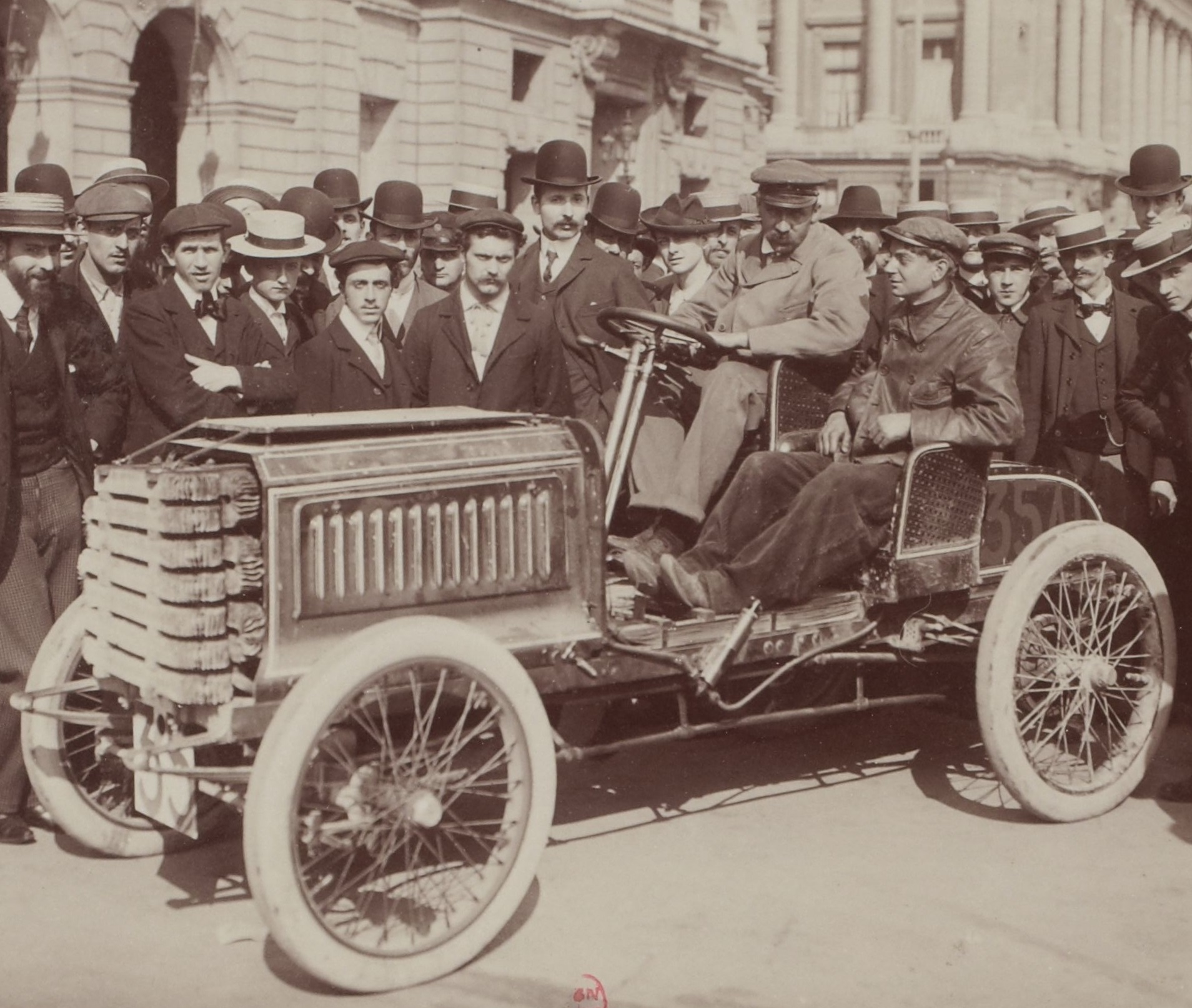 [Collection Jules Beau. Photographie sportive] : T. 18. Année 1902 / Jules Beau : F. 19v. [Paris - Vienne, épreuve de vitesse]